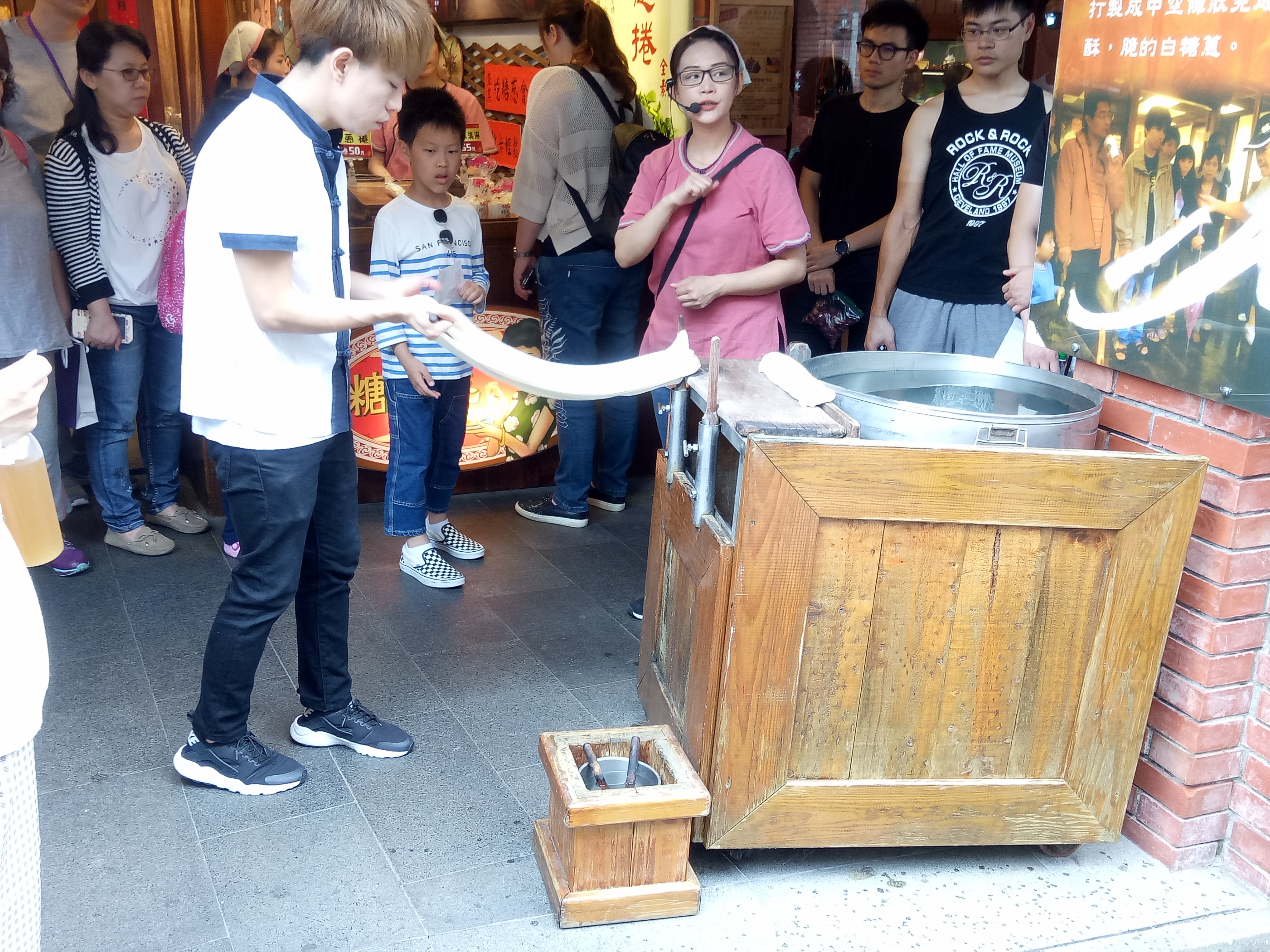 糖蔥製作。 (宜蘭國立傳統藝術中心)